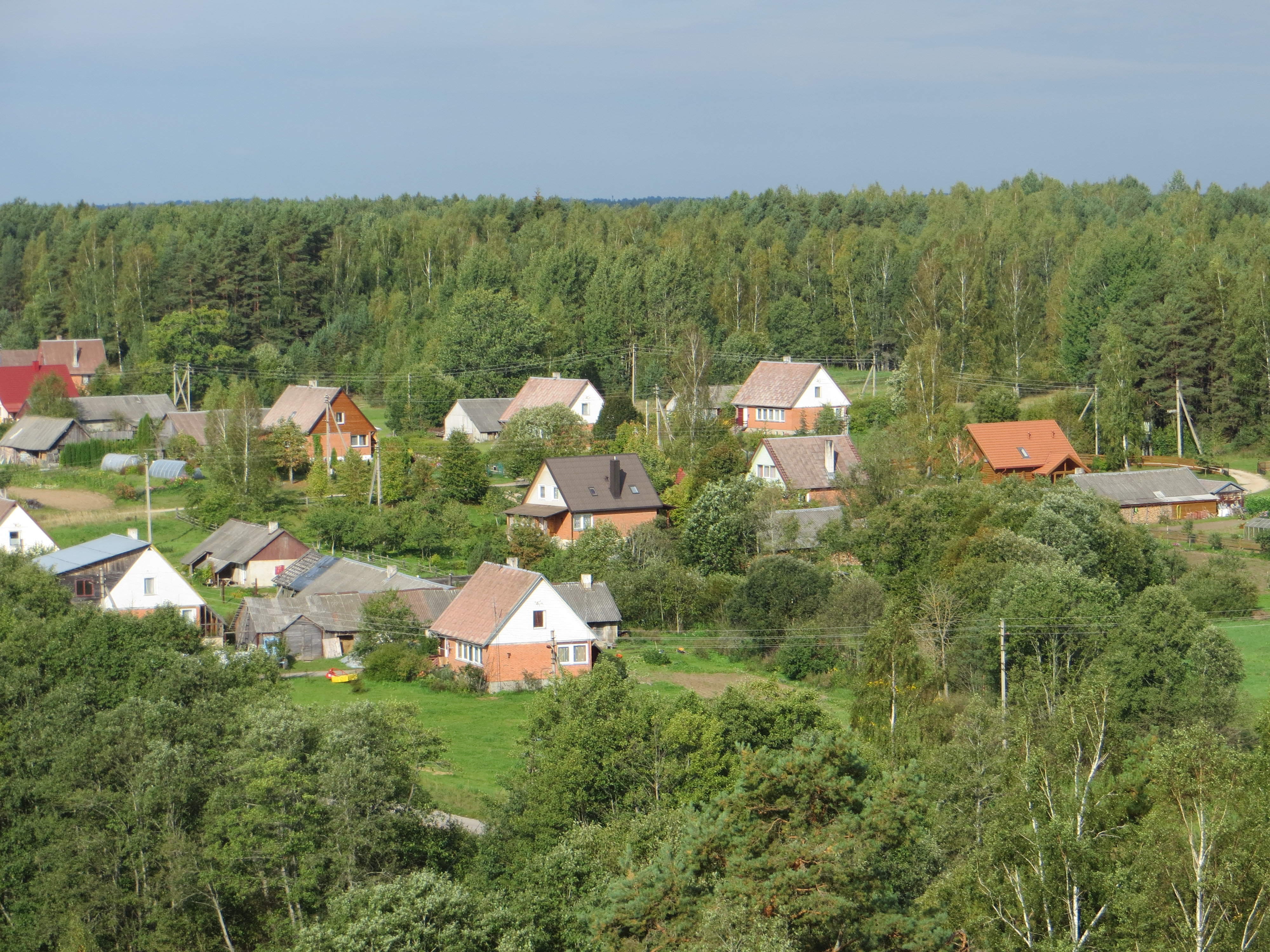 Kazitiškio sen., Lithuania